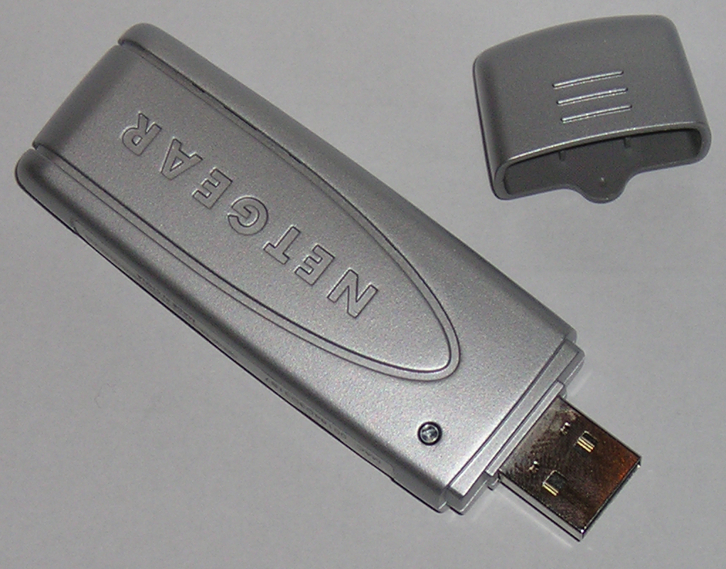 Netgear WLAN USB Adapter